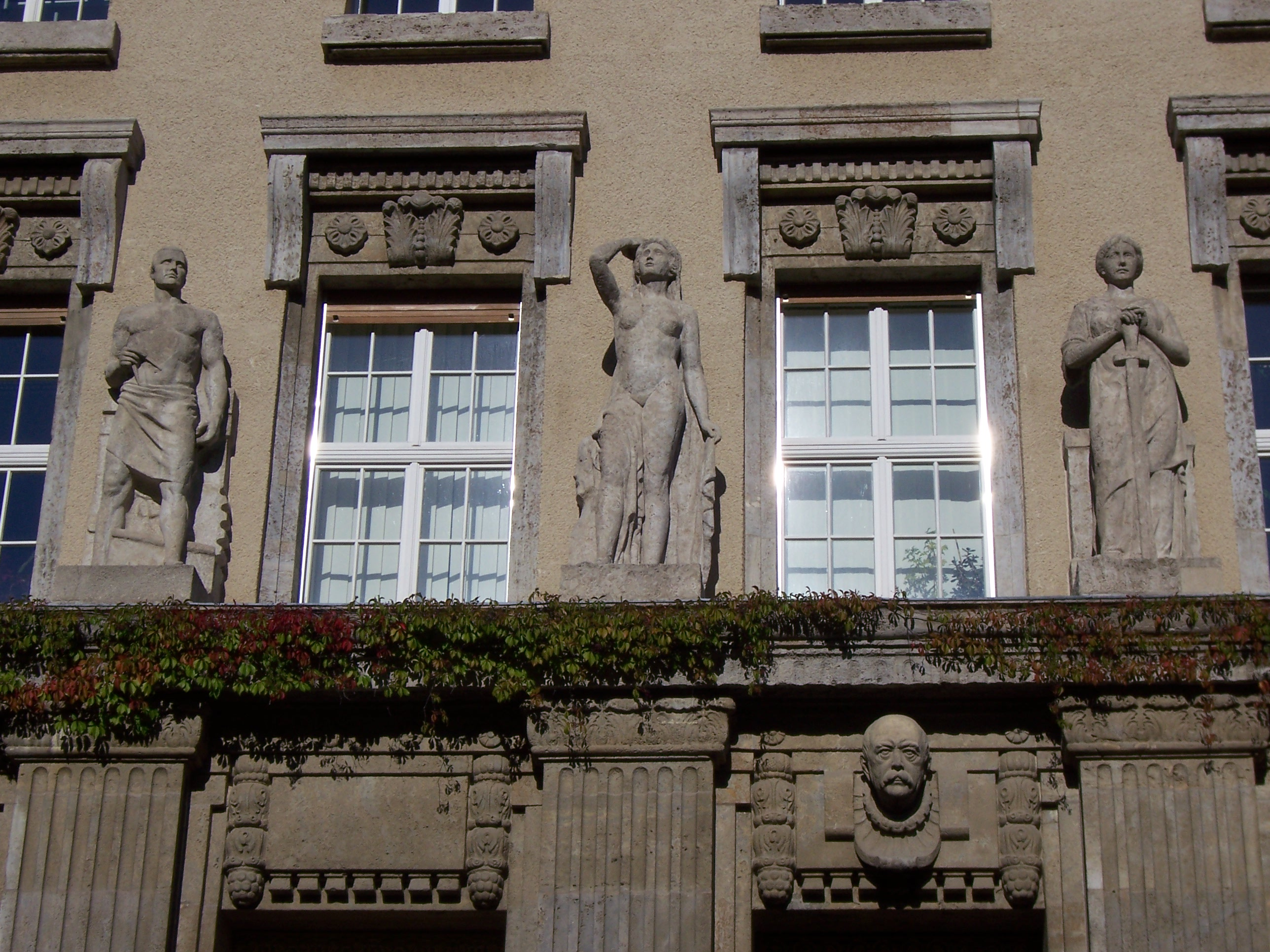 Fassadenskulpturen, Deutsche Bücherei Leipzig